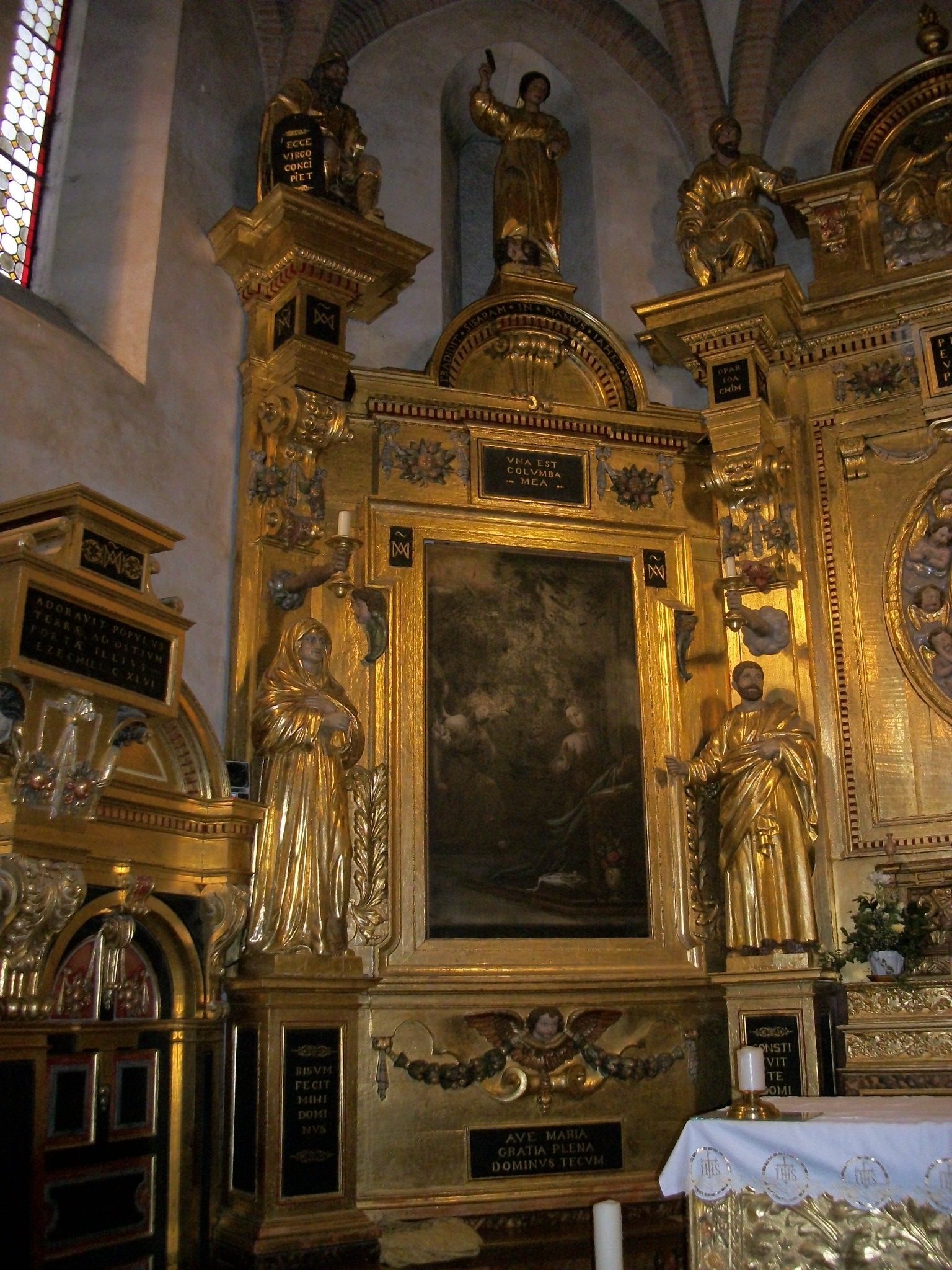 Le retable du chœur.